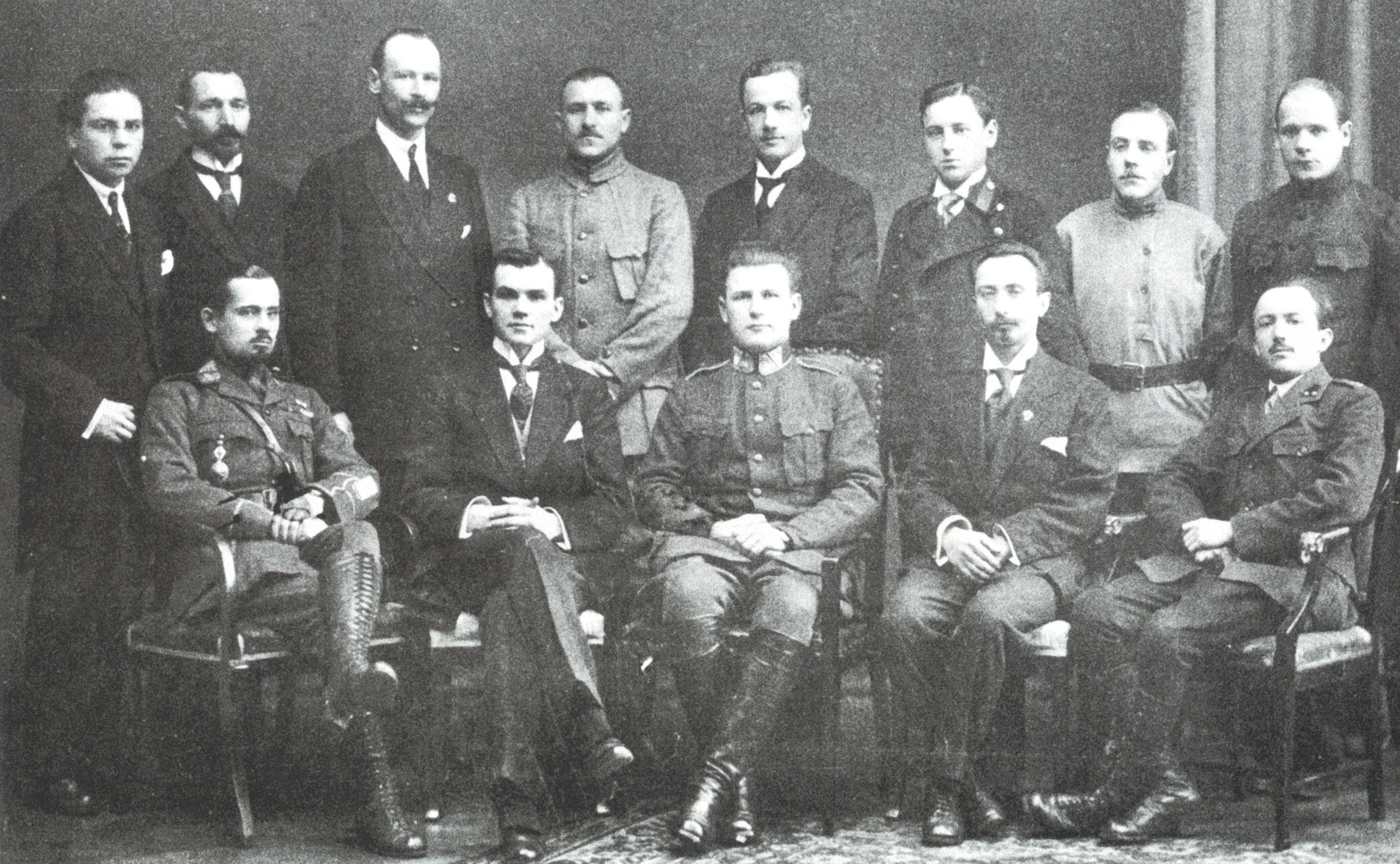 Рада беларускай калоніі ў Латвіі. Сядзяць (справа налева): консул БНР у Рызе Б. Шымковіч, намеснік старшыні Рады А. Сыдяпура, шэф Вайскова-дыпляматычнай місіі БНР у Латвіі і Эстоніі К. Езавітаў, старшыня Рады Я. Данілюк, прадстаўнік асобага аддзелу БНР у Эстоніі Мінгрэльскі; стаяць сябры Рады: Я. Сьпіцын, В. Найдзёнаў, П. Цьвяткоў, В. Быкаў, Р. Казячы, Д. Кадаўва, В. Дзюбанаў, А. Калмановіч. Рыга, 1920 г. (НАРБ.).